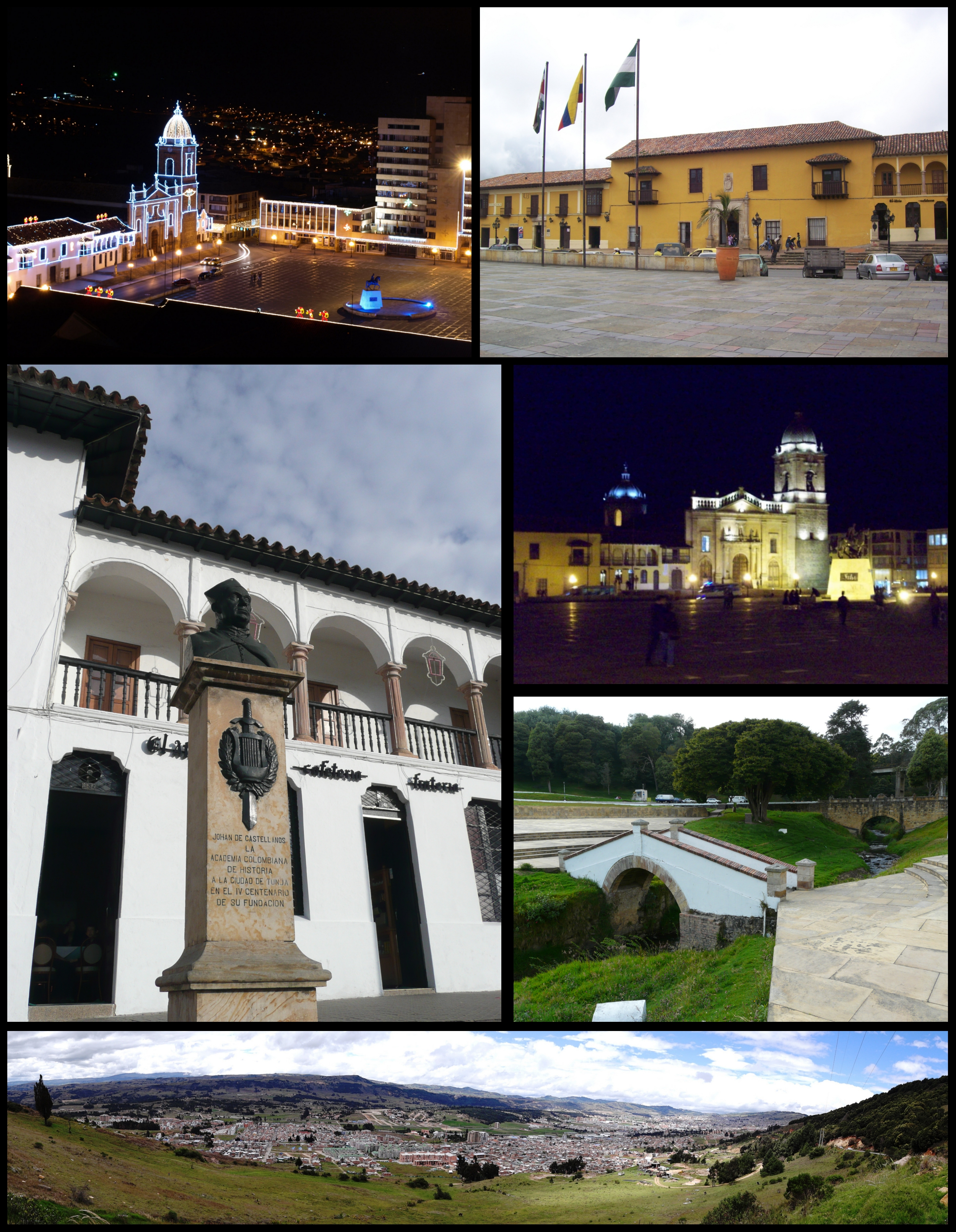 Montages of Tunja, Colombia